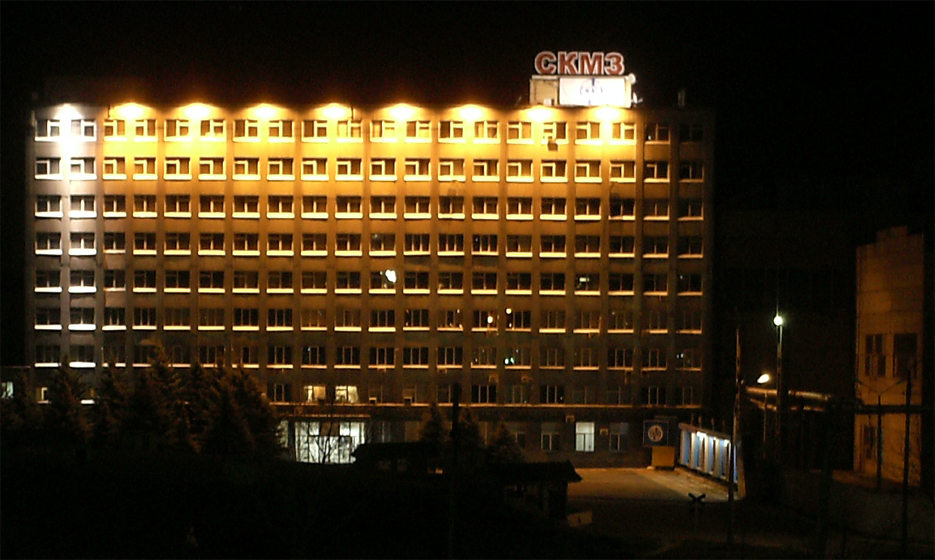 Краматорськ, СКМЗ: Краматорськ, інженерний корпус СКМЗ вночі